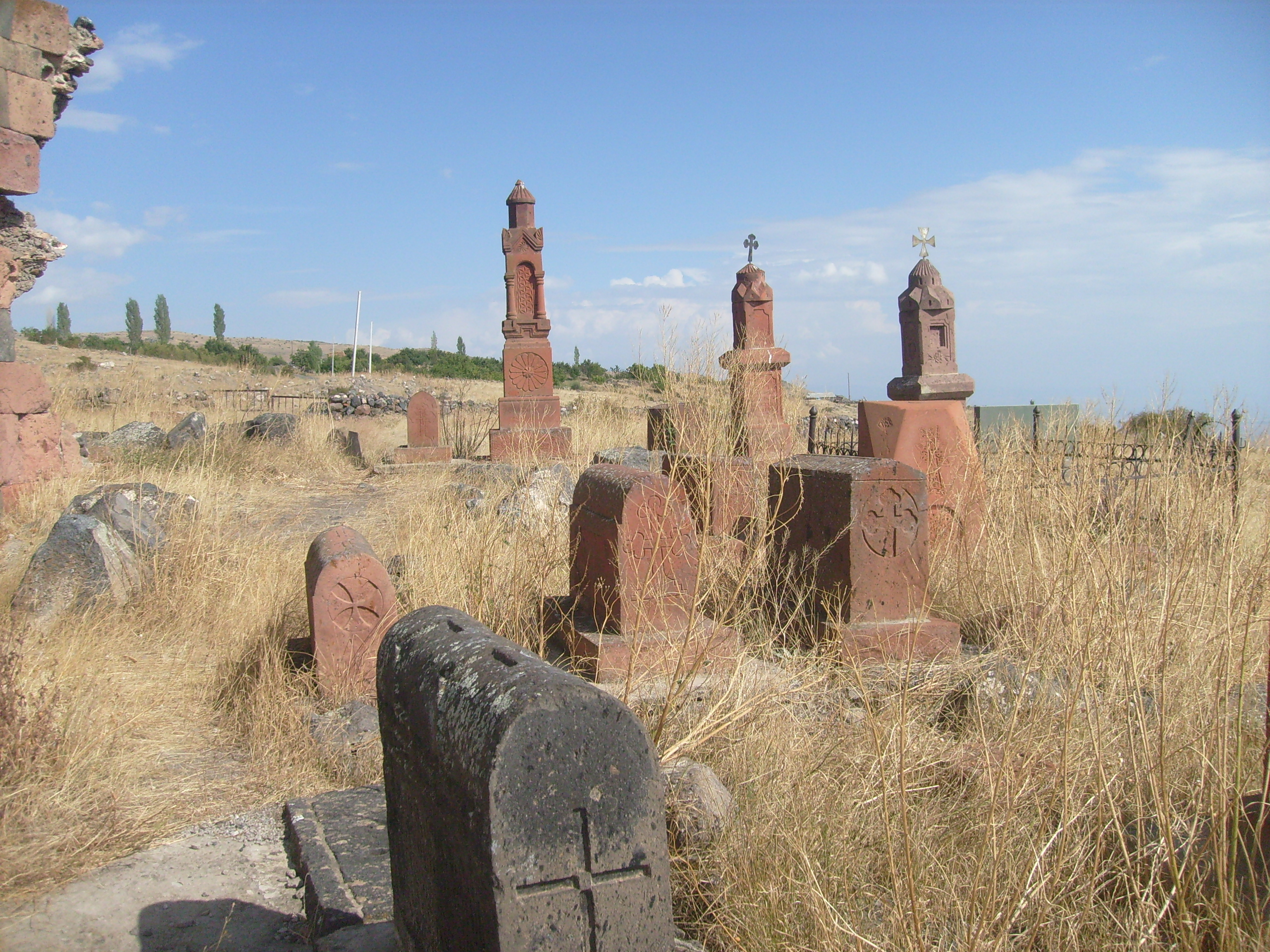 Գյուղատեղի Սասունիկ, 7-19 դդ. 105/6.1.1